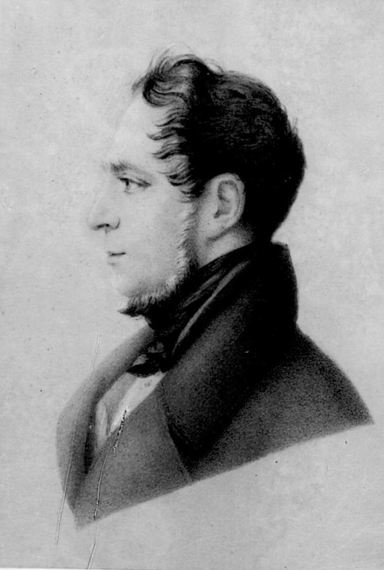 Адольфа Полье (1795—1830)